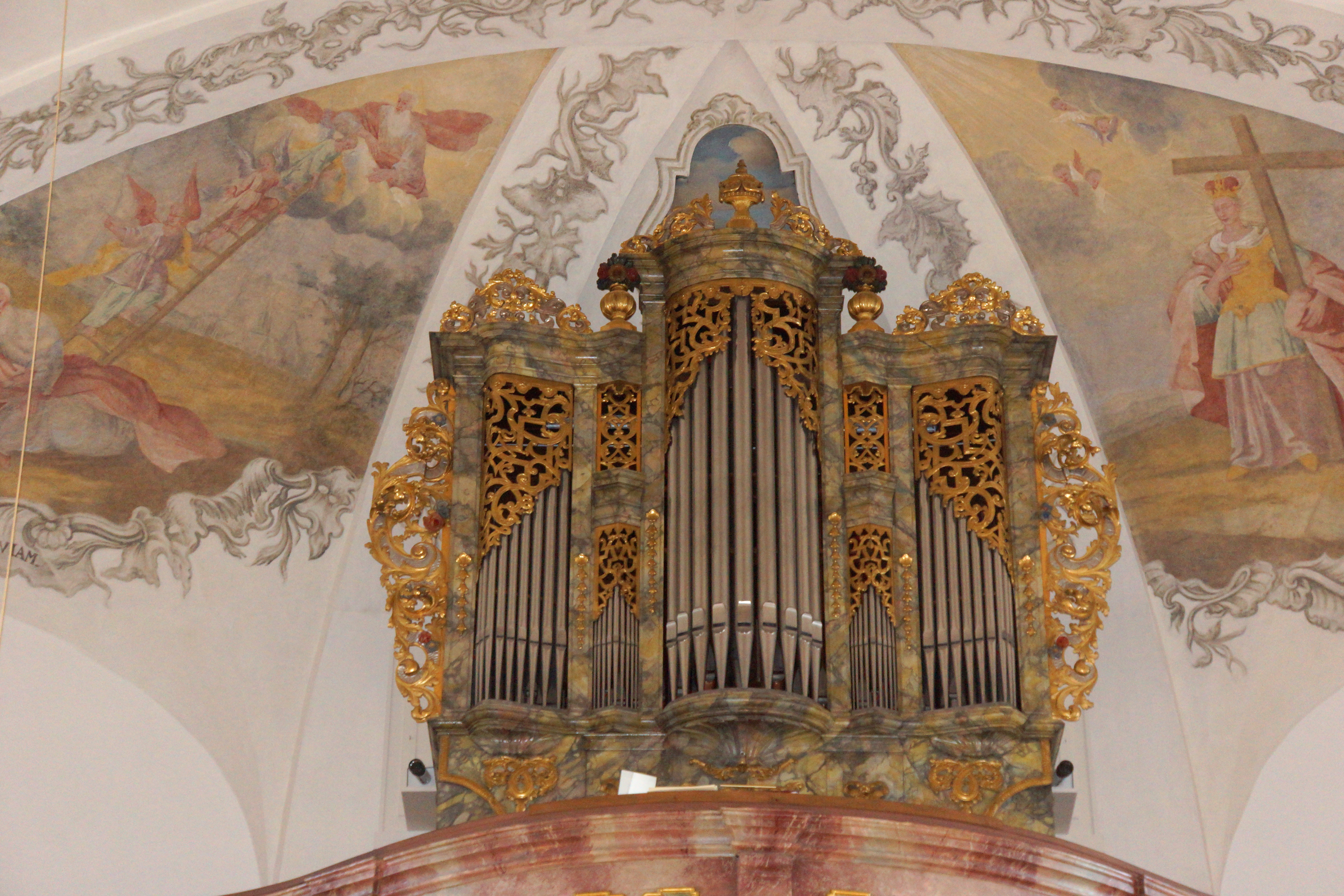 Die katholische Pfarrkirche St. Ägidius in Vilseck in der Oberpfalz